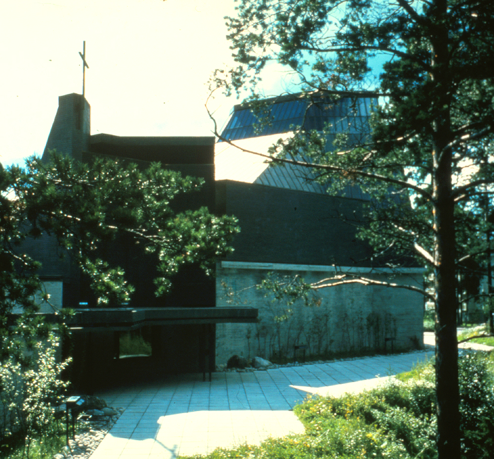 Espoonlahden kirkko. Espoo, Finland